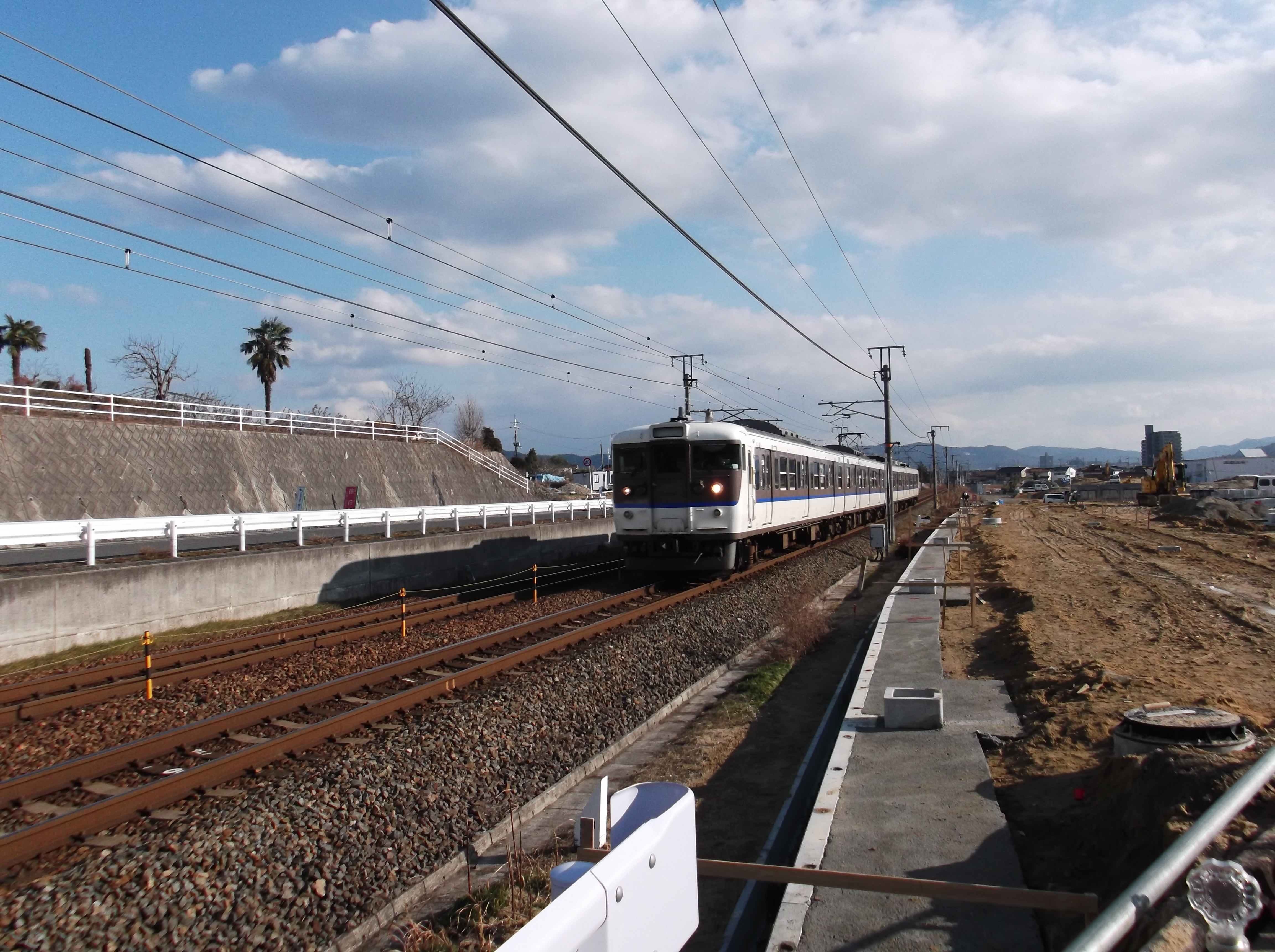 寺家駅建設予定地を通過する115系C編成